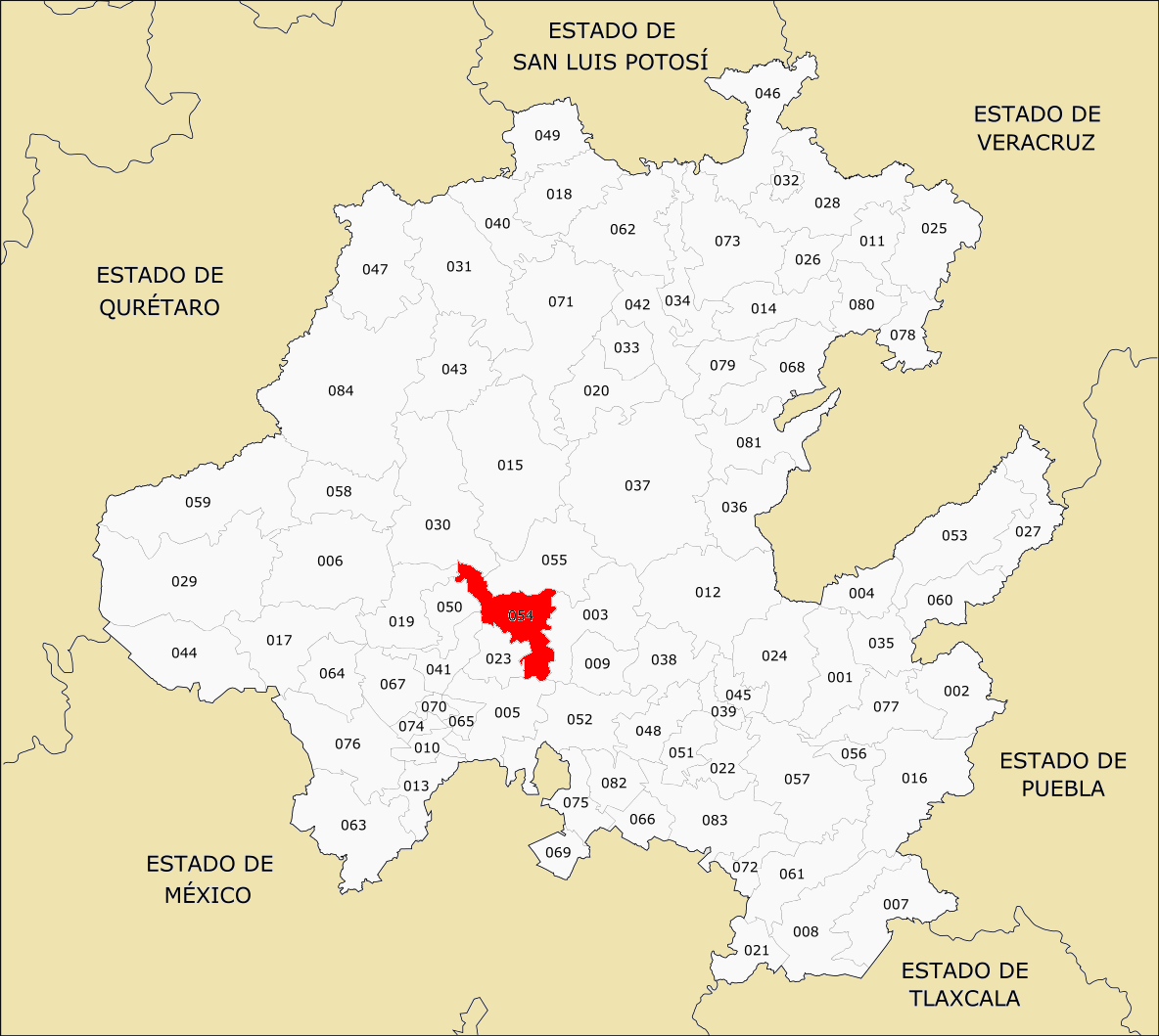 Municipio de Hidalgo